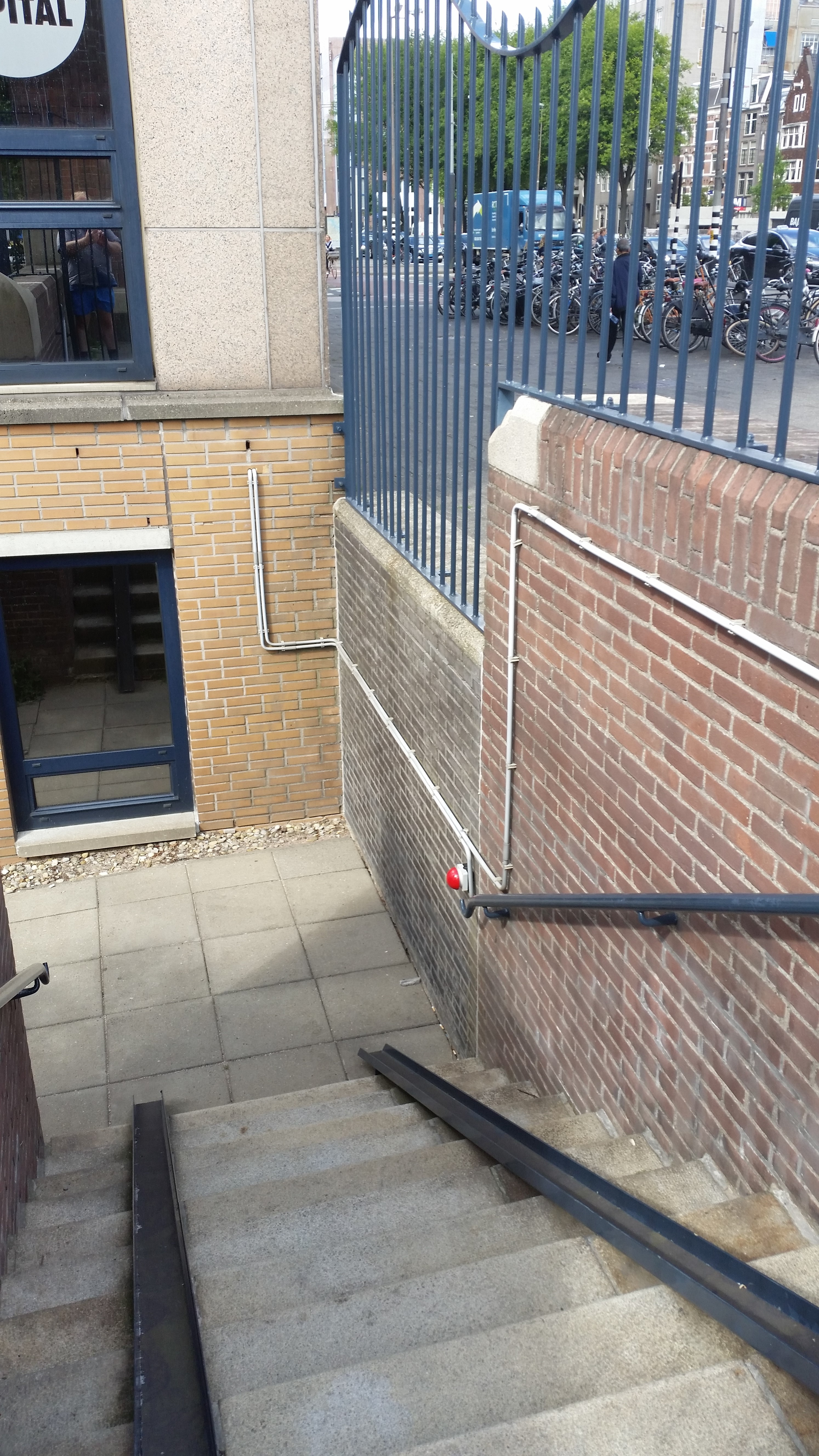 Brug 465 aan de kant van de Huddekade, dichtgemetseld